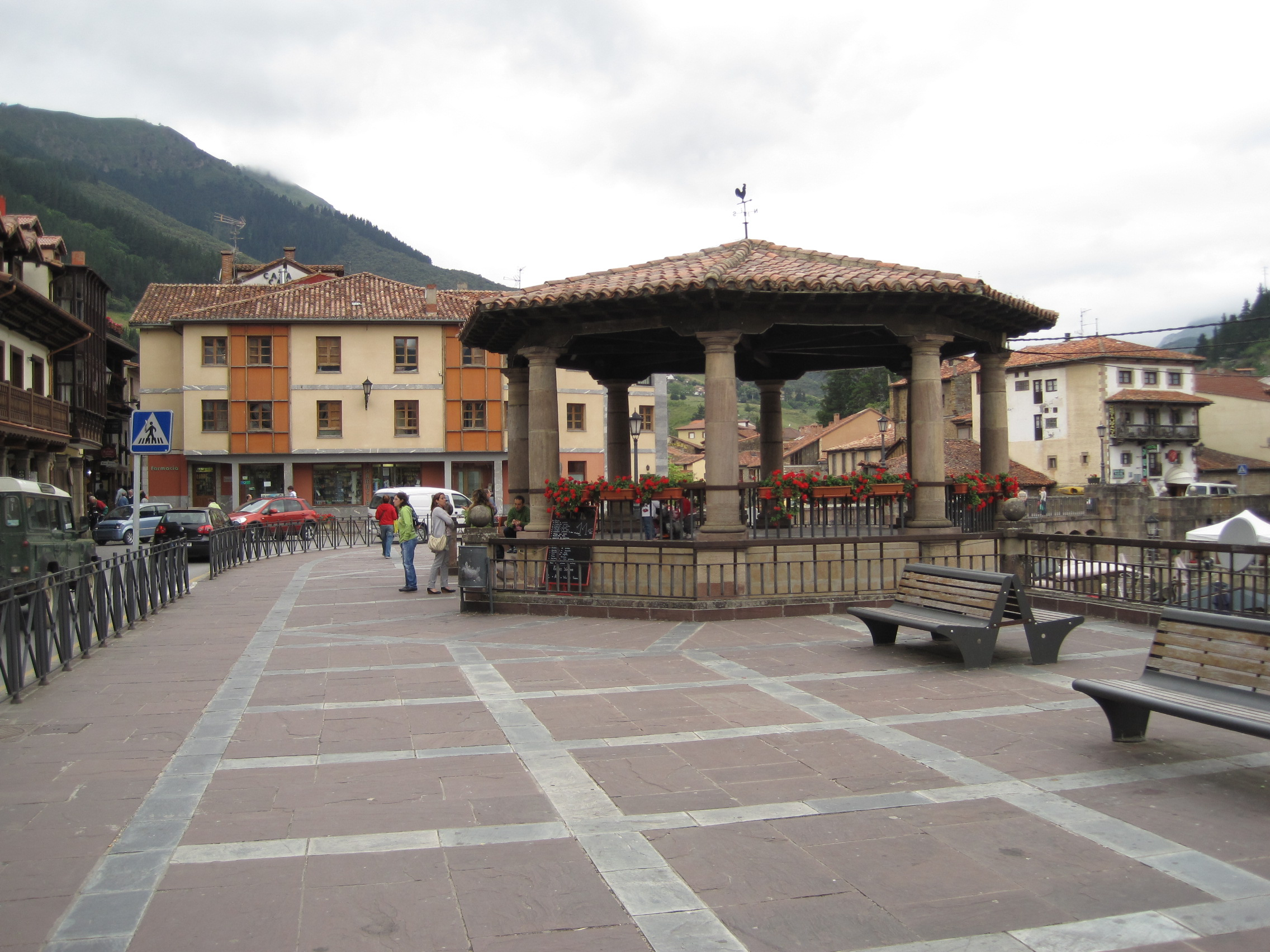 Plaza Capitán Palacios, en Potes (Cantabria, España).